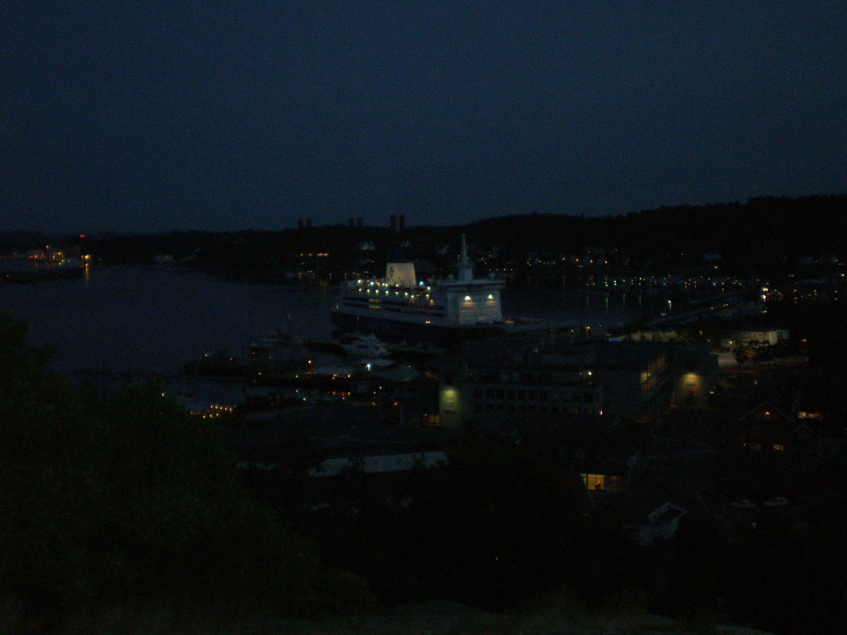 Sandefjord, Norwegia